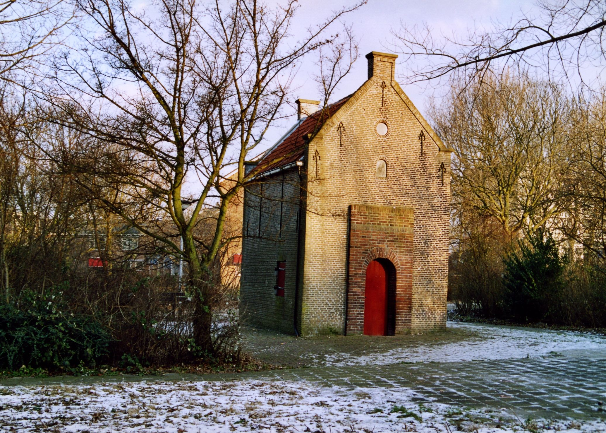 De gevangenis van het verdwenen kasteel Capelle te Capelle aan den IJssel.